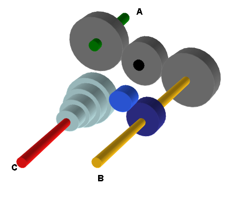 Prinzipdarstellung des Schwenkradgetriebes(Nortongetriebe)